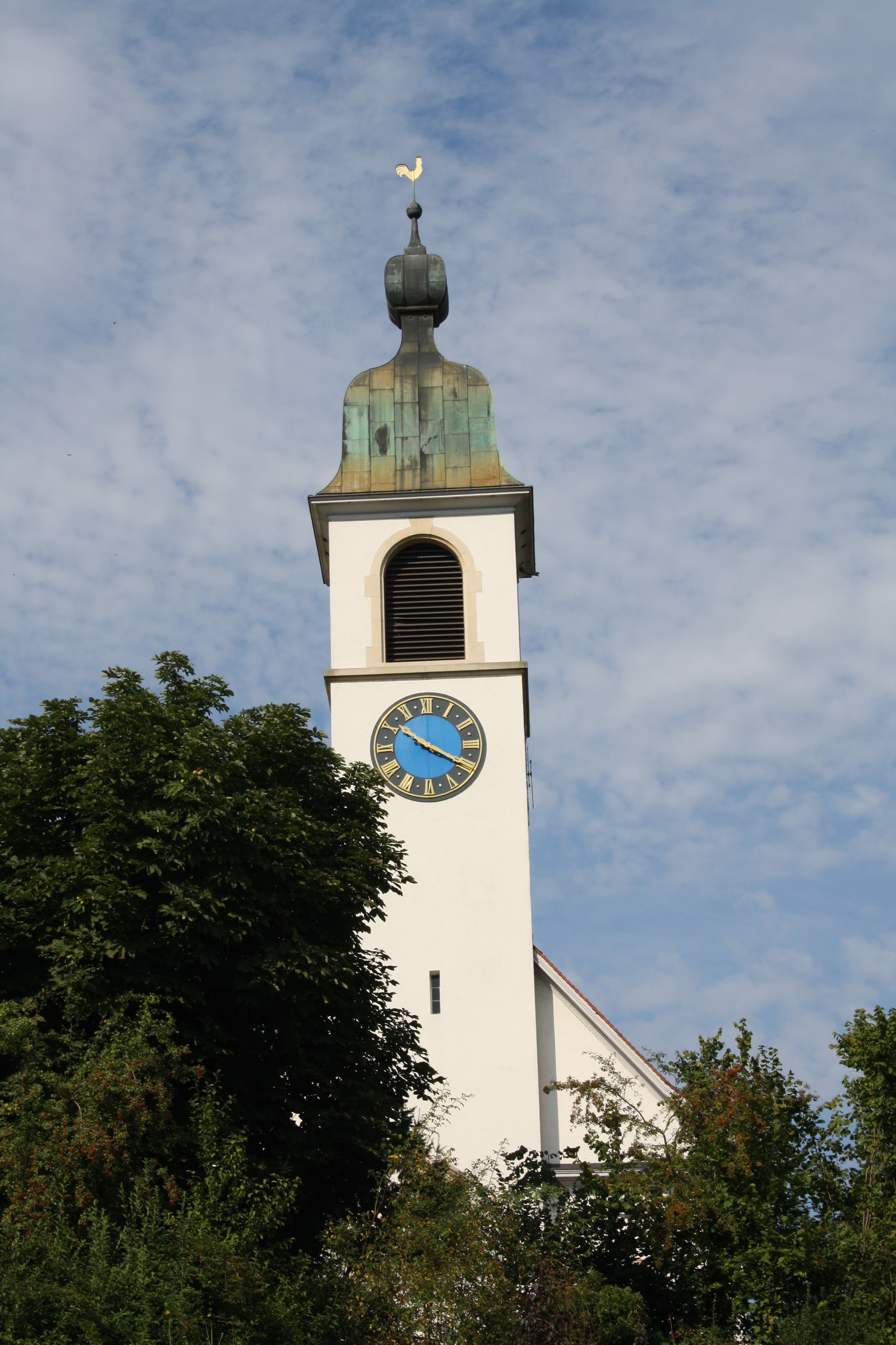 Rupperswil